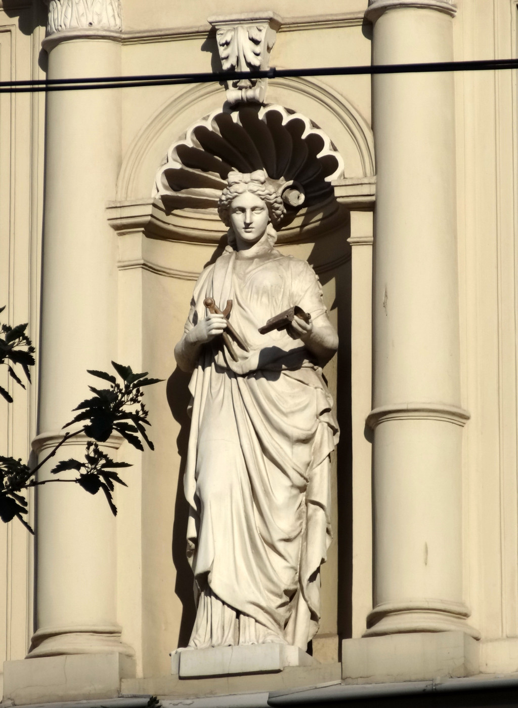 Kamienica przy ul. Gdańskiej 60 w Bydgoszczy